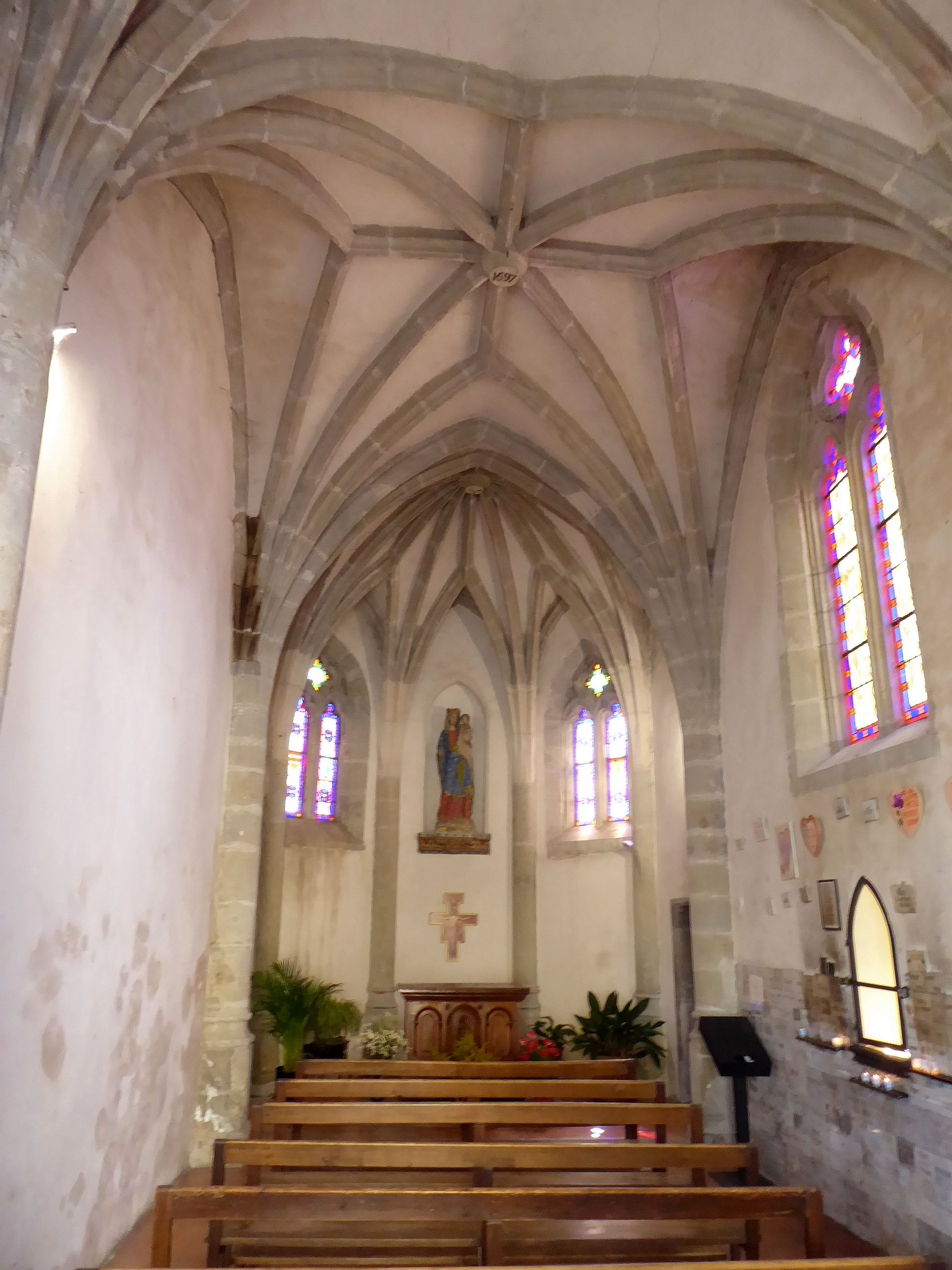 Chapelle Notre-Dame-de-Santé de Carcassonne